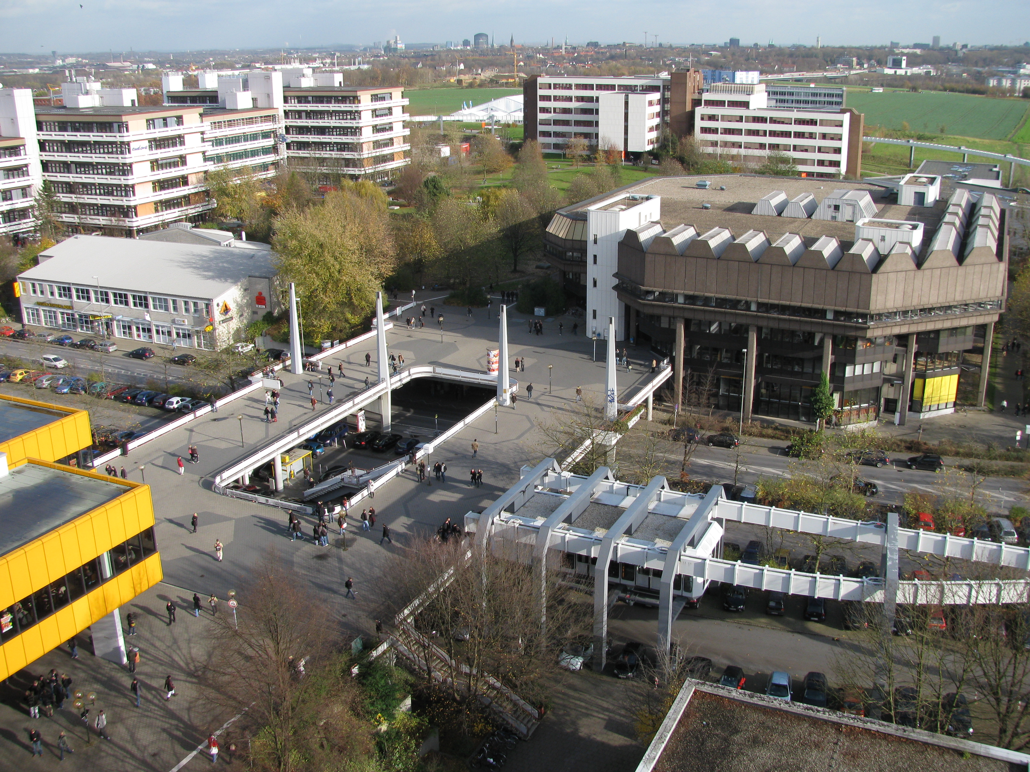 Mensa, Mensambrücke, H-Bahnhaltestelle, Unibibliothek der Uni Dortmund (von links nach rechts) vom Mathetower aus fotografiert